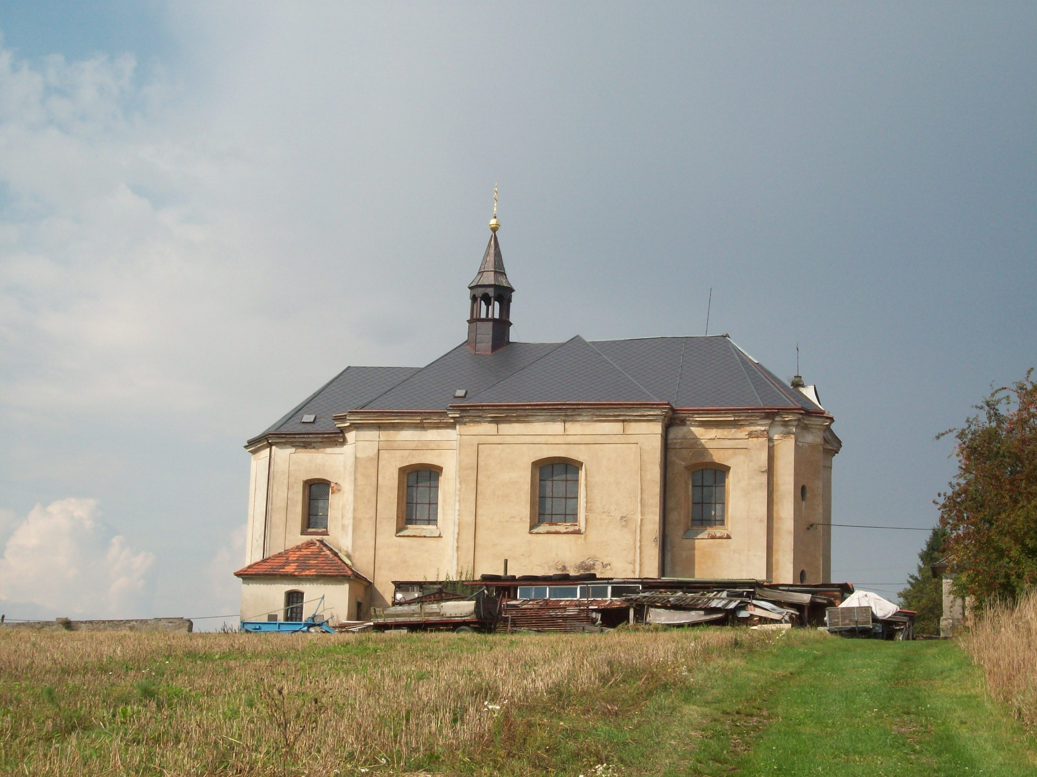 Hlohovice, okres Rokycany, kostel Nejsvětější Trojice.